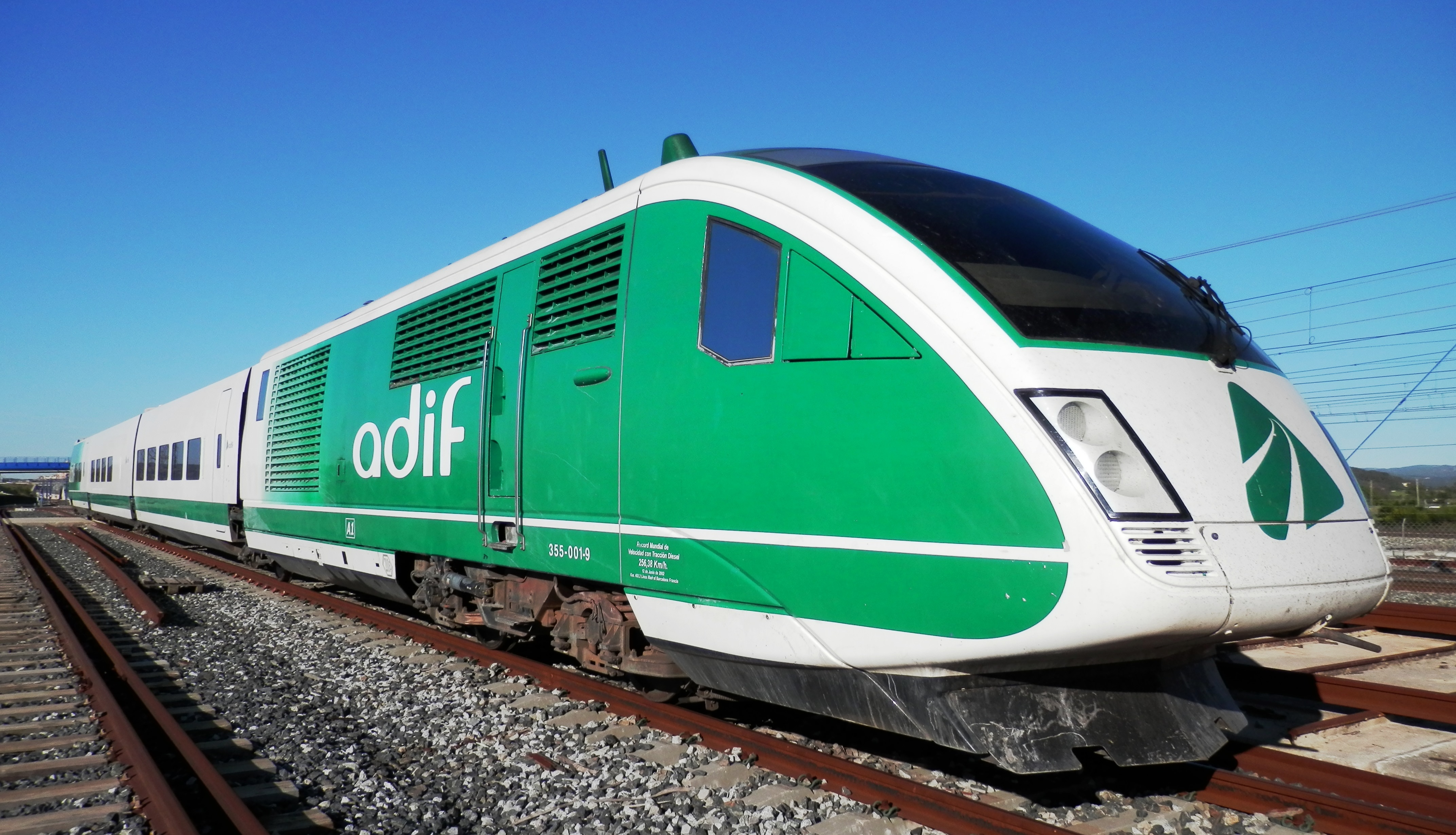 Talgo XXI, Talgo BT o Serie 355, BT.001 Virgen del Rocio